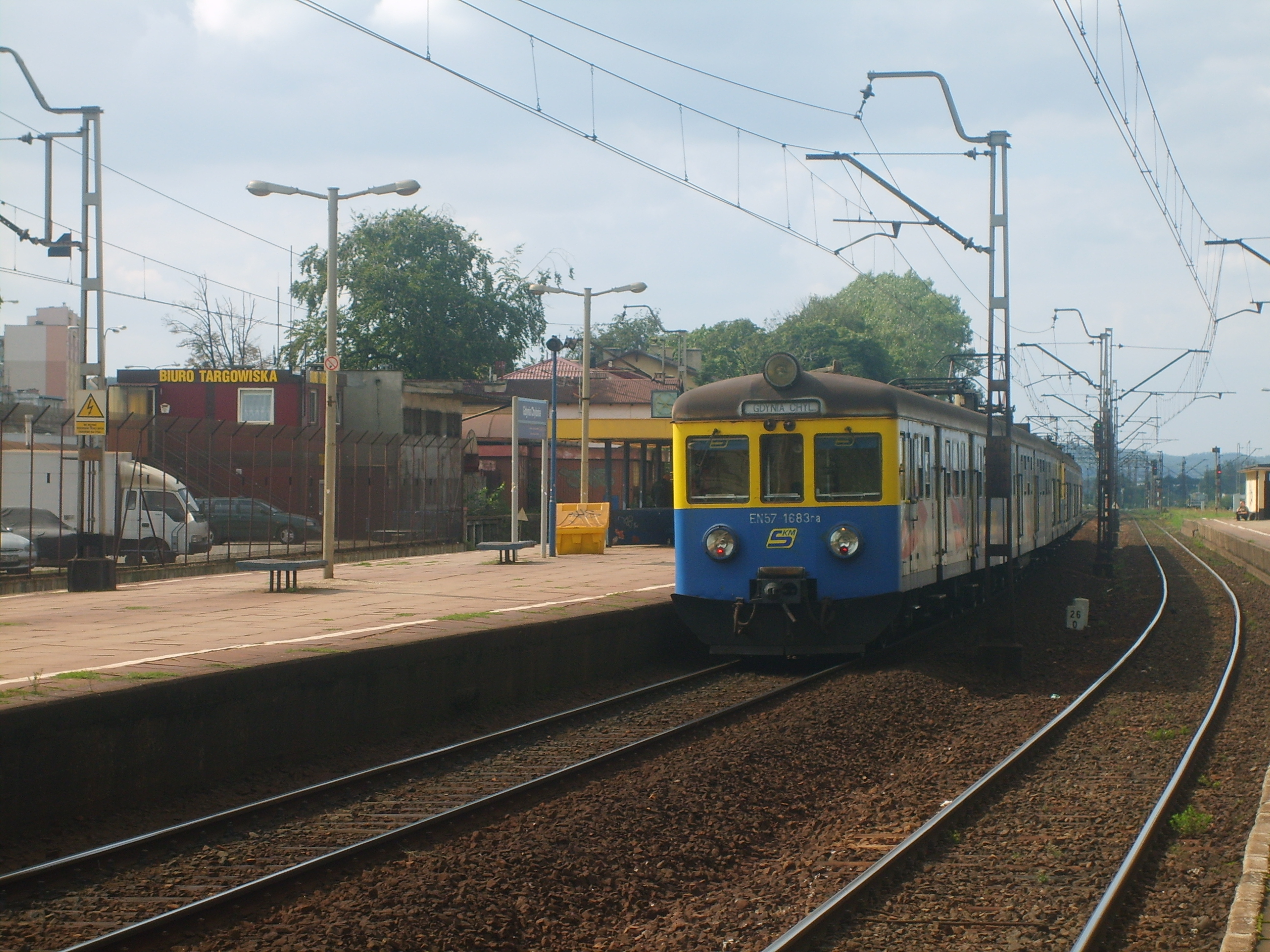 Stacja SKM Gdynia Chylonia